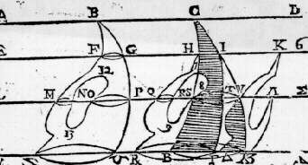 Cavalieri's manuscript